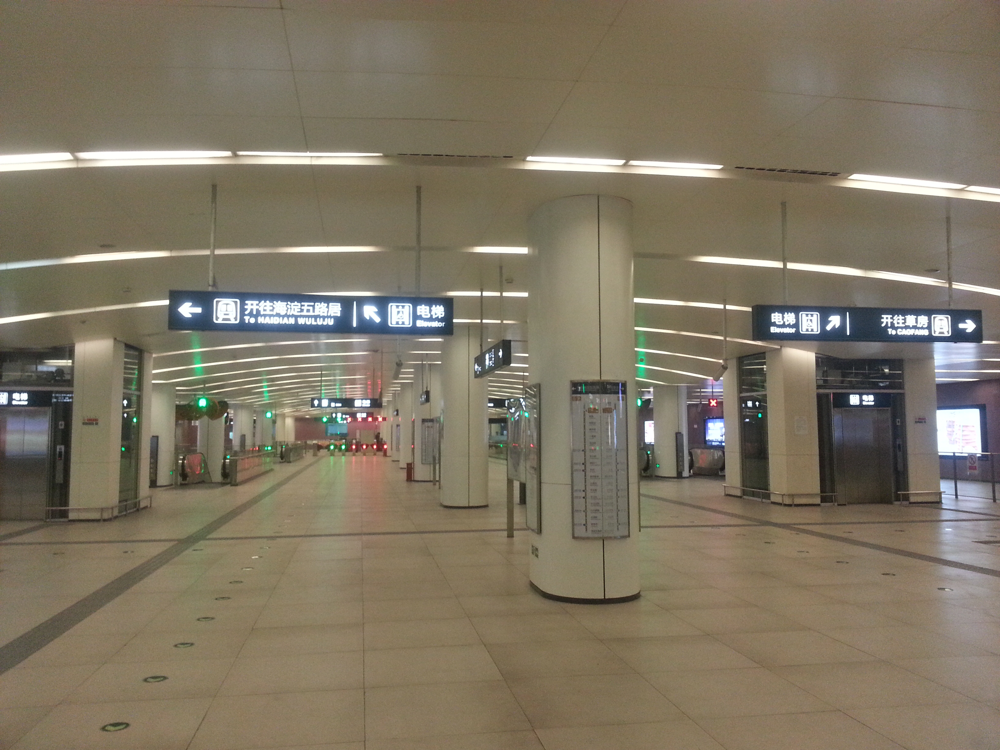 常营站站厅